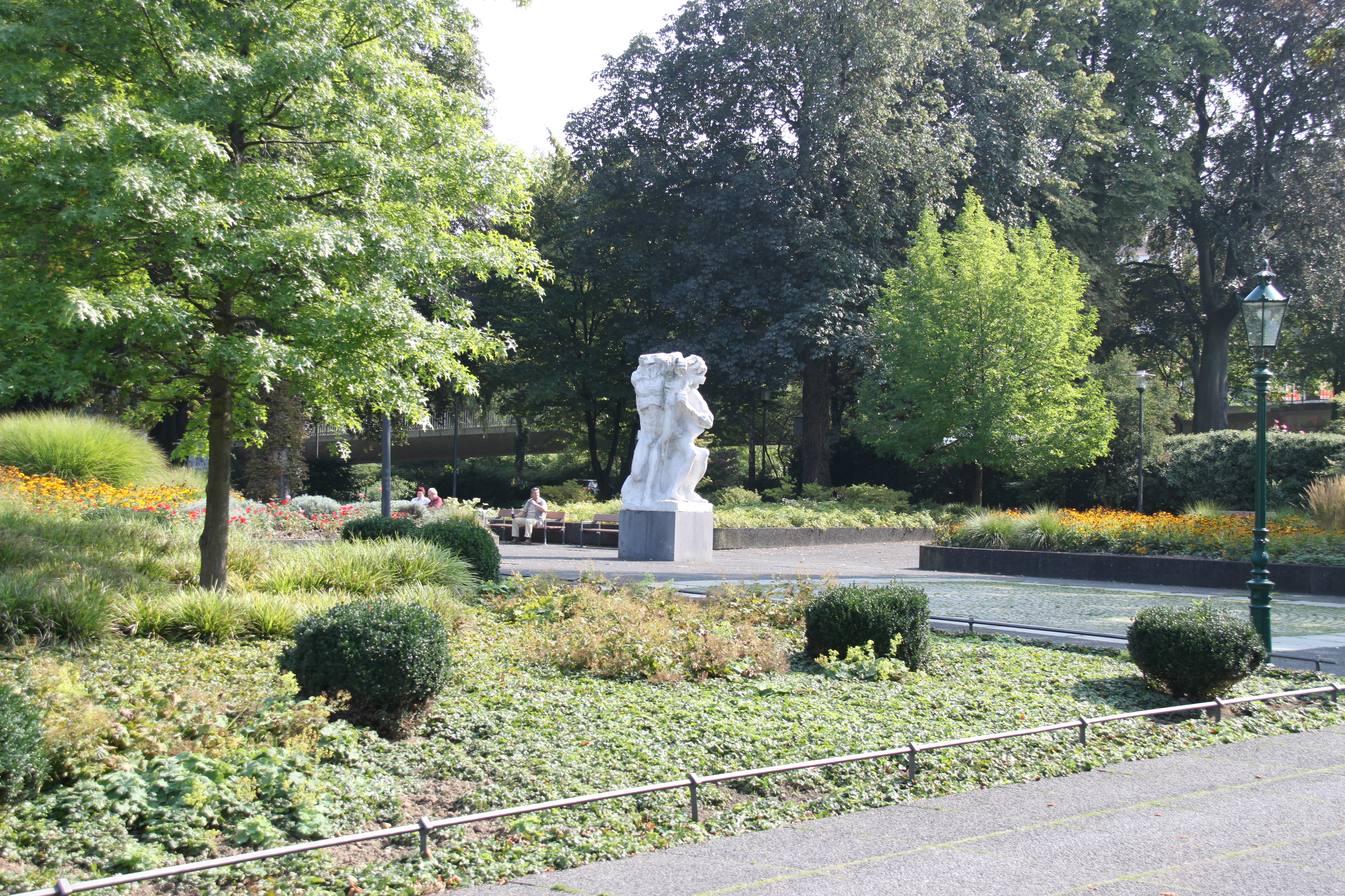 Die Strake Linke im Engelsgarten, Wuppertal